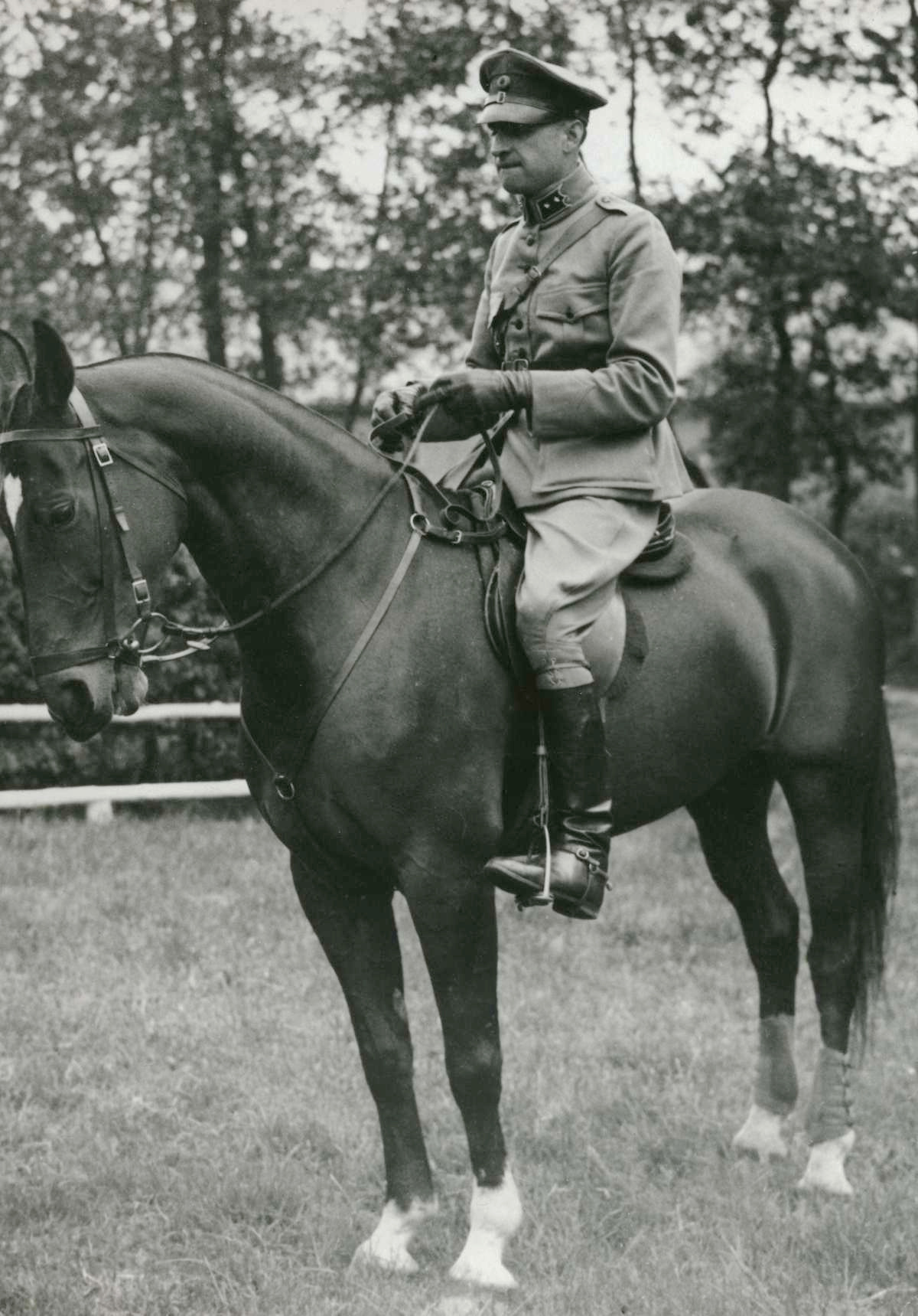 Olympische Spelen Los Angeles 1932. Ruiter Luitenant Karel Johan Schummelketel op zijn paard.